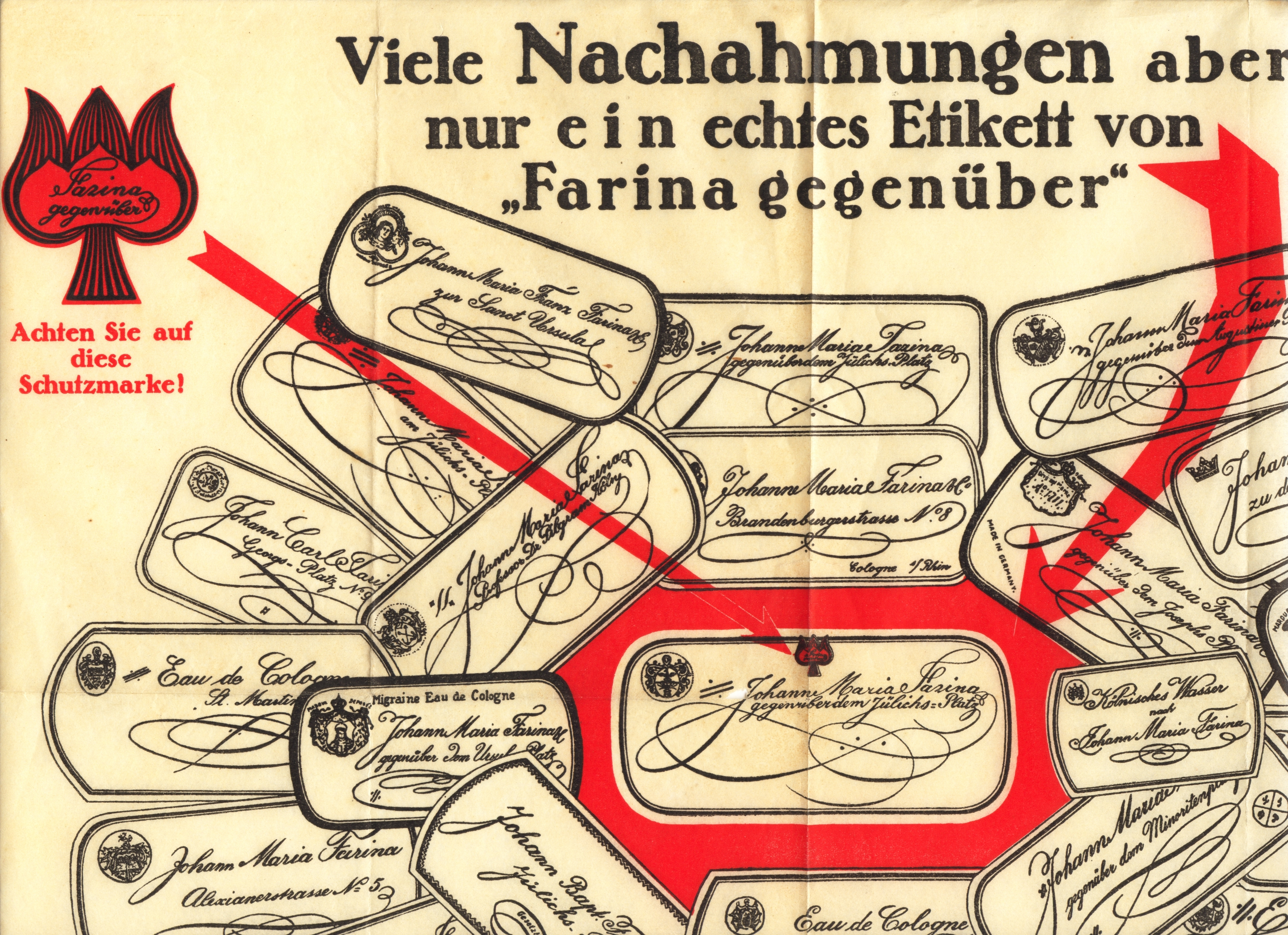 Farina Nachahmer